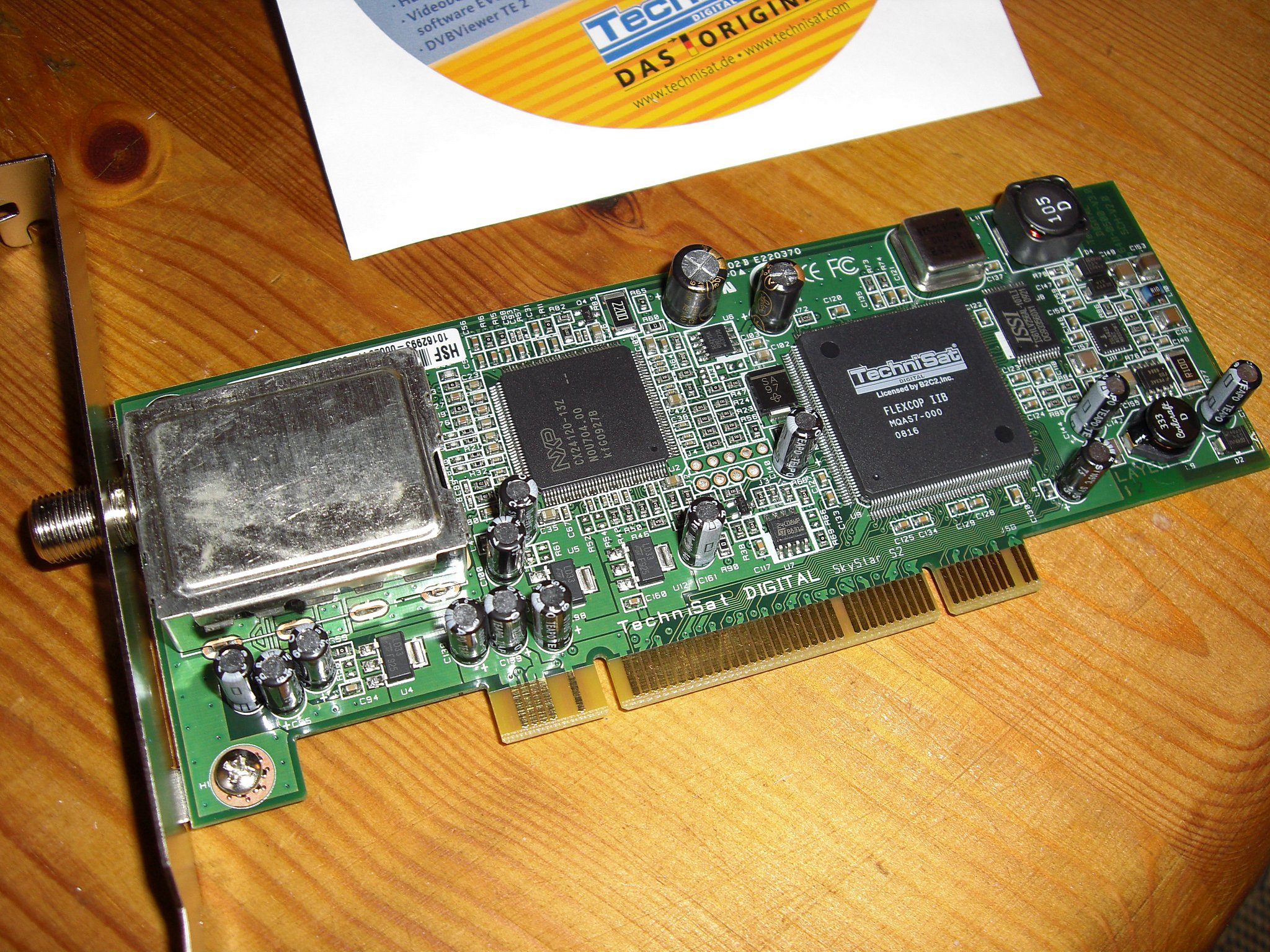 Technisat SkyStar S2